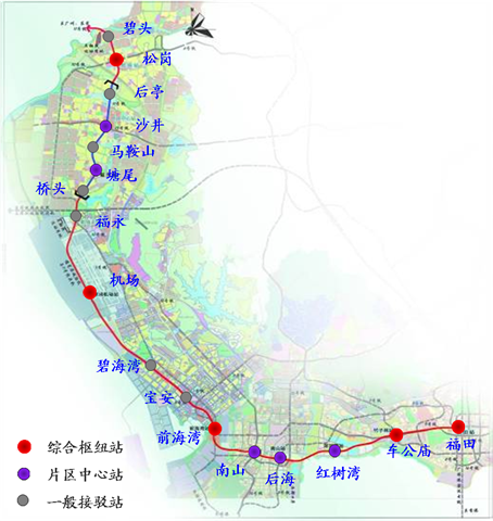 深圳地铁机场线（11号线）站点命名方案。